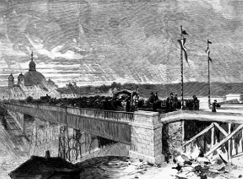 Antiguo viaducto de Madrid, sobre la calle de Segovia